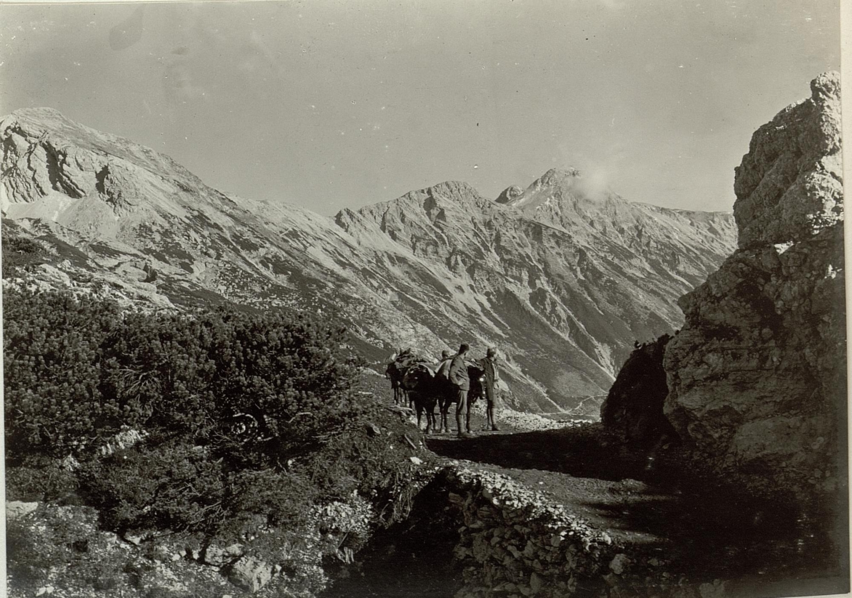 Mali und veliki Bogatin.